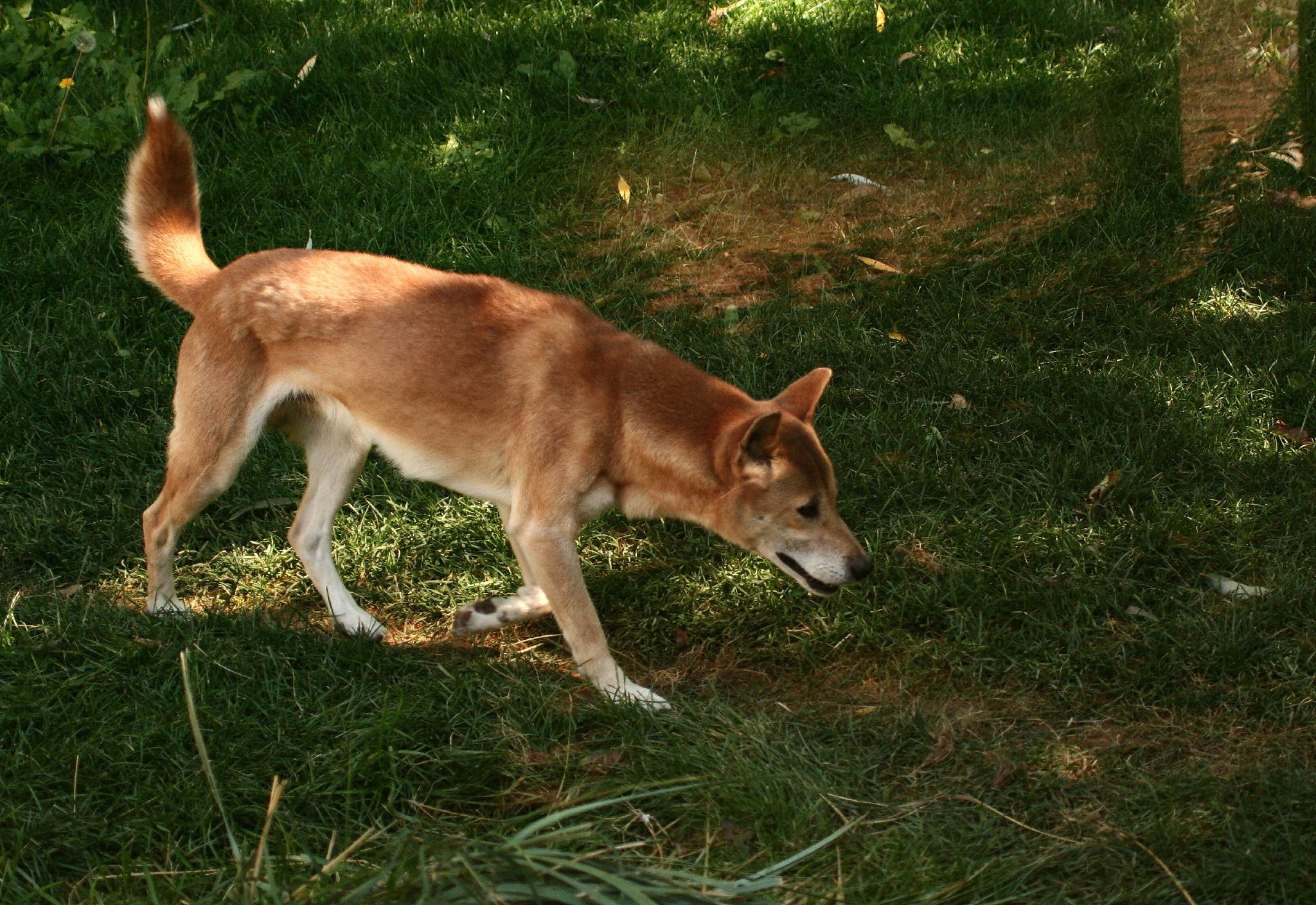 A New Guinea Singing Dog, walking on a trail.